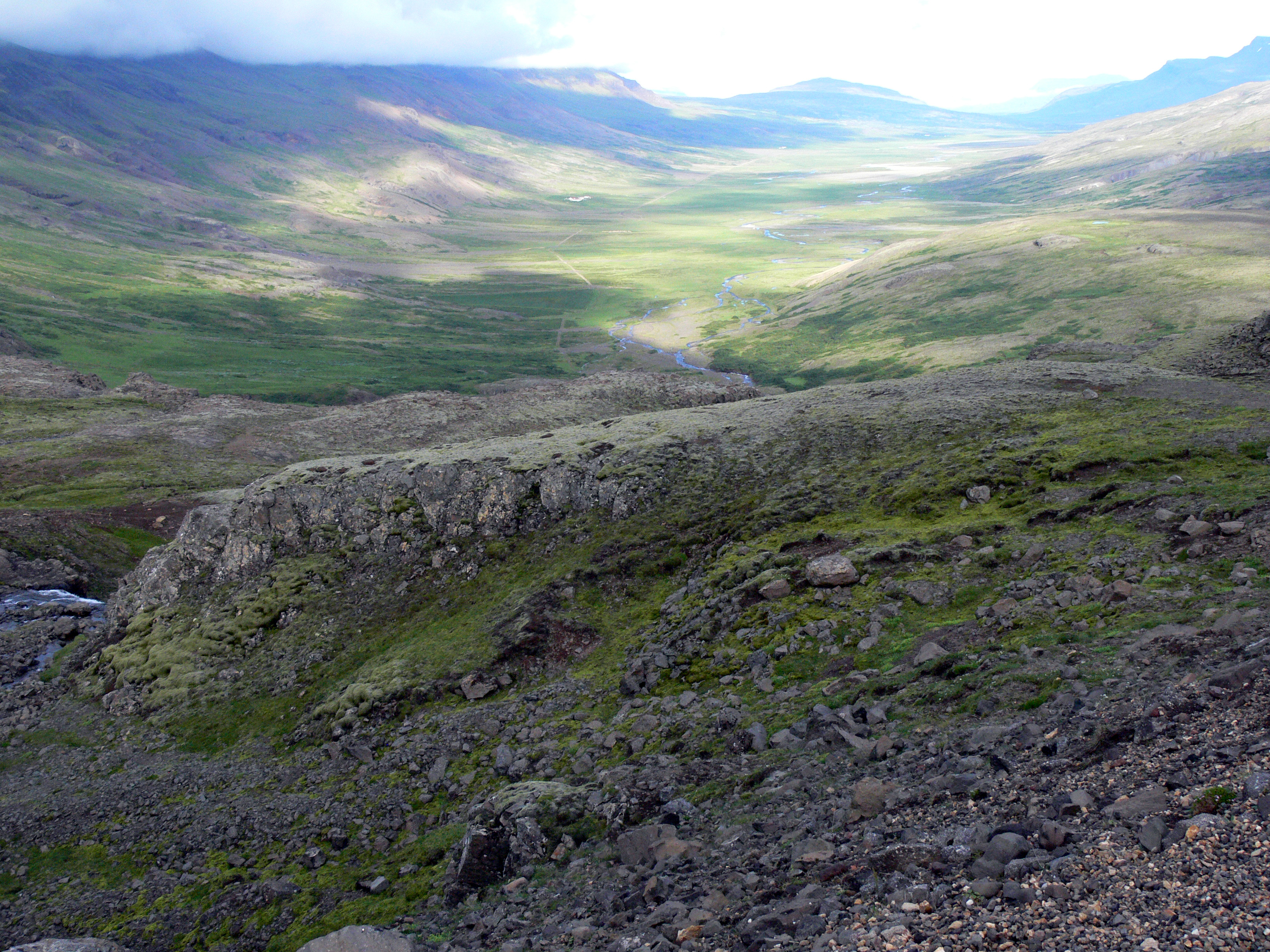 Hrafnkelsdalur. Gehörte zum Gebiet des Goden Hrafnkell in der Hrafnkels saga.